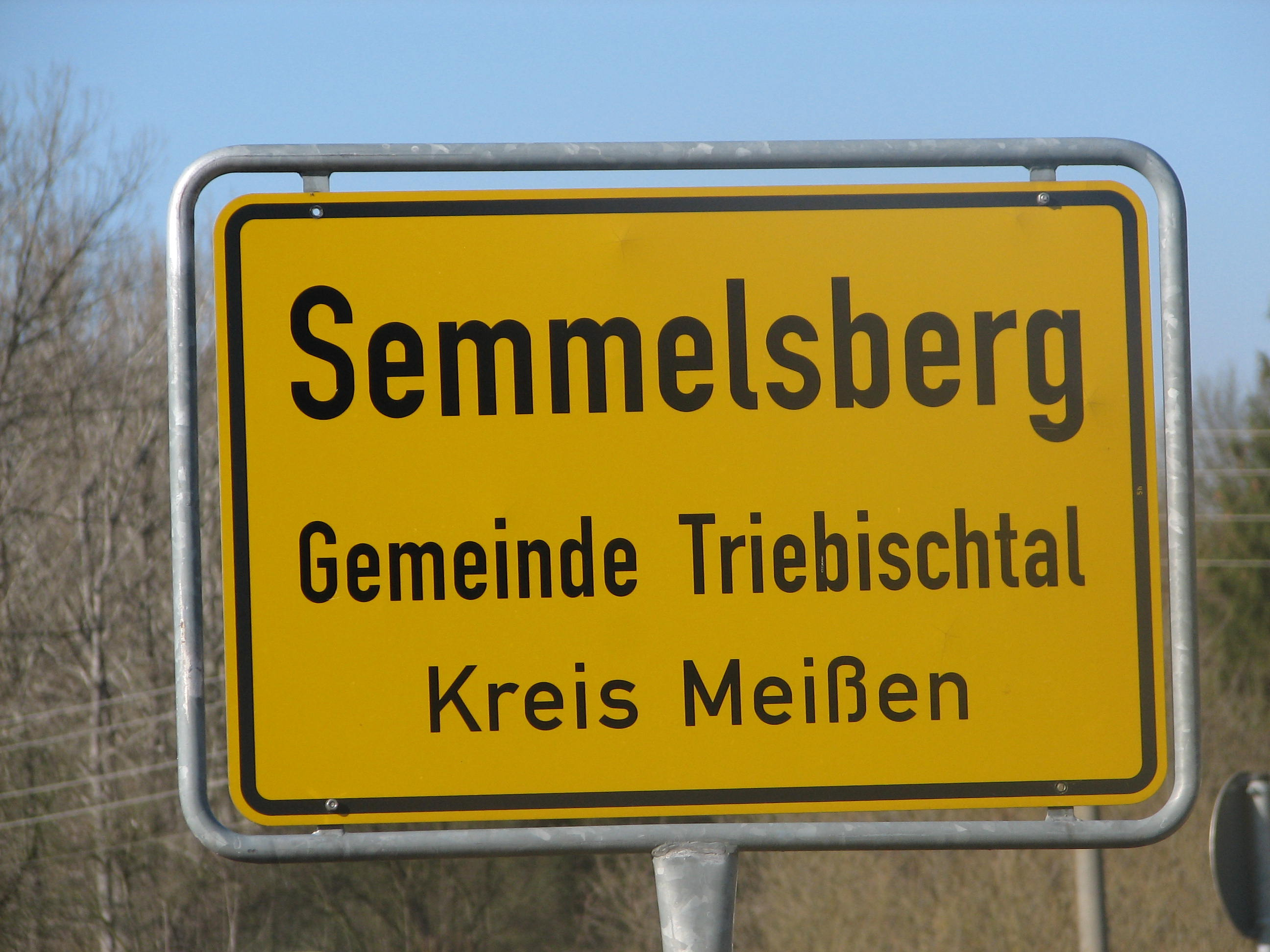 Ortsteingangsschild von Semmelsberg, Gemeinde Triebischtal, Landkreis Meißen